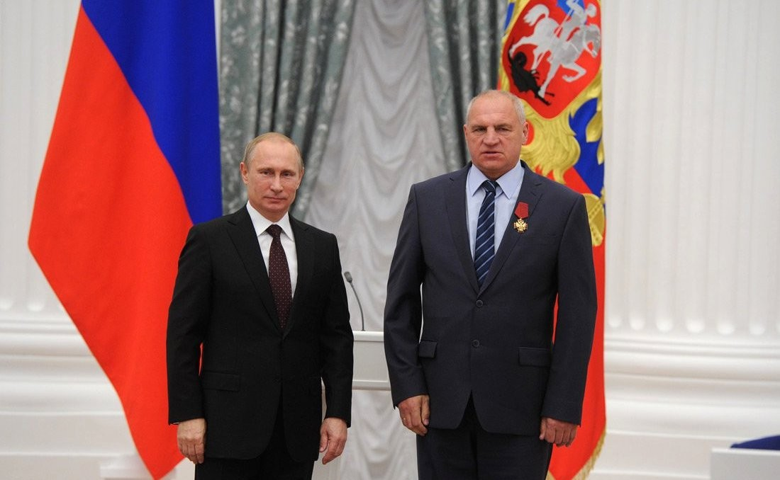 Орденом «За заслуги перед Отечеством» IV степени награждён Сергей Гончаров